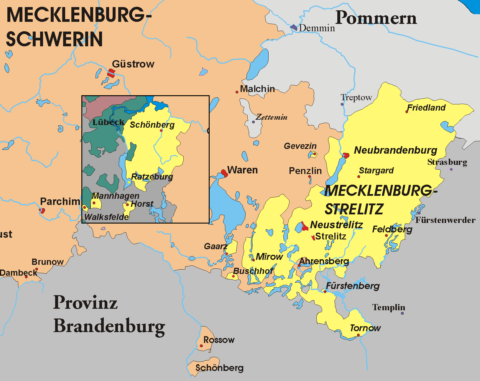 Territorium (Groß-)Herzogtum Mecklenburg-Strelitz von 1866 bis 1934 (Ausschnitt aus)